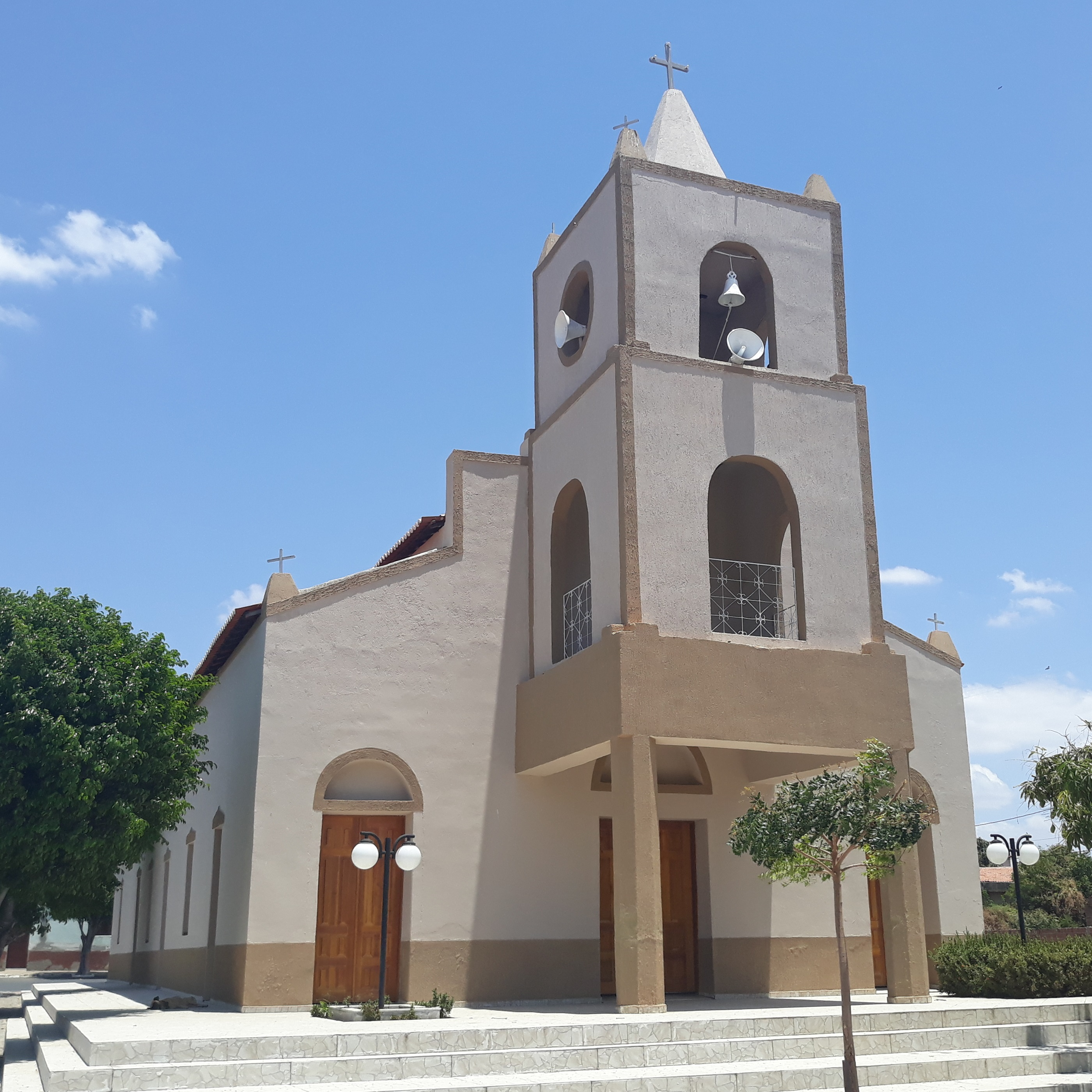 Português do Brasil: Capela de São Sebastião, padroeiro de Taboleiro Grande - Rio Grande do Norte, Brasil.